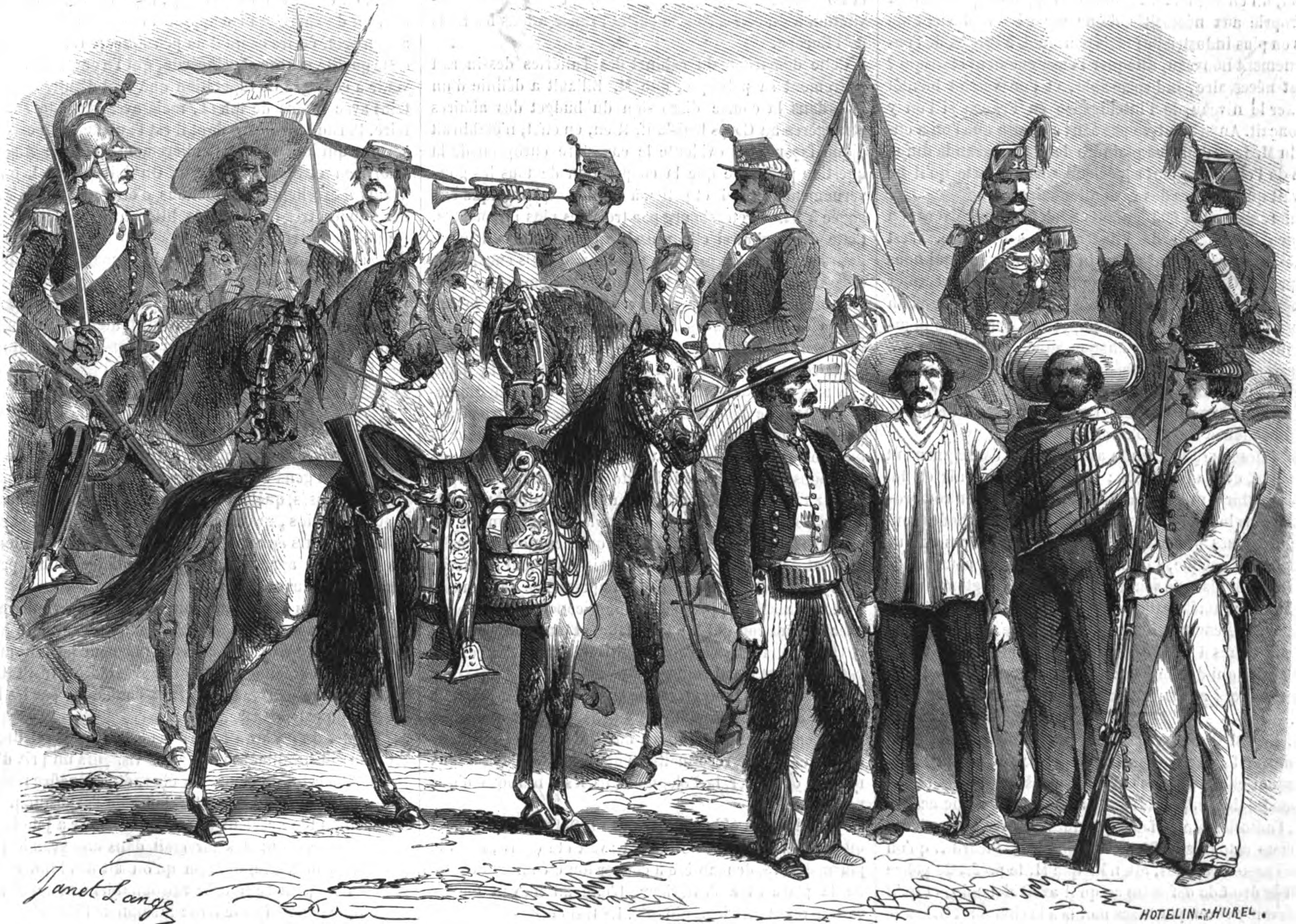 Soldats de l'armée mexicaine (d'après un croquis de M. Girardin, officier au 1er chasseurs d'Afrique).